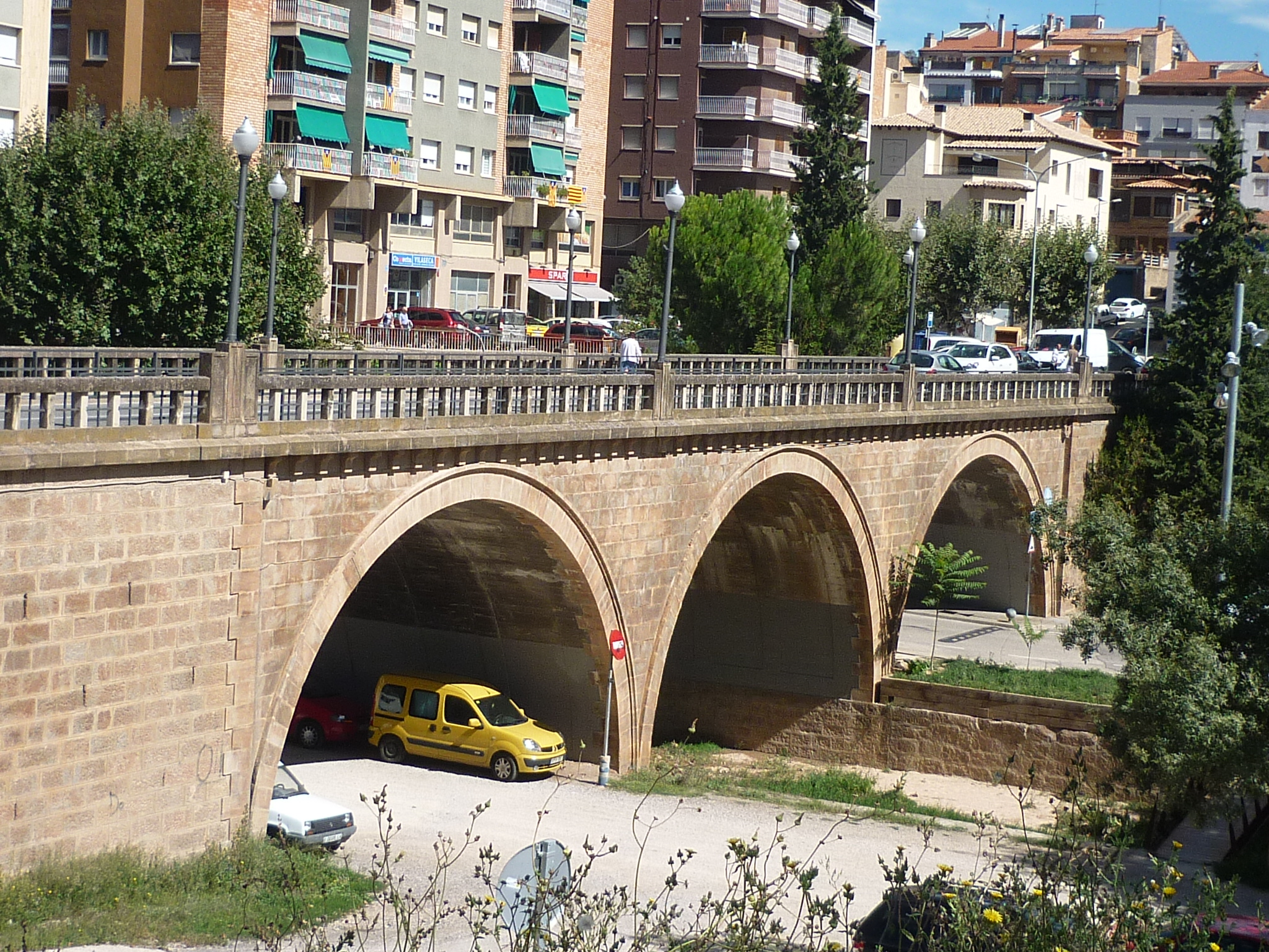 Pont de Solsona, sobre el riu Negre